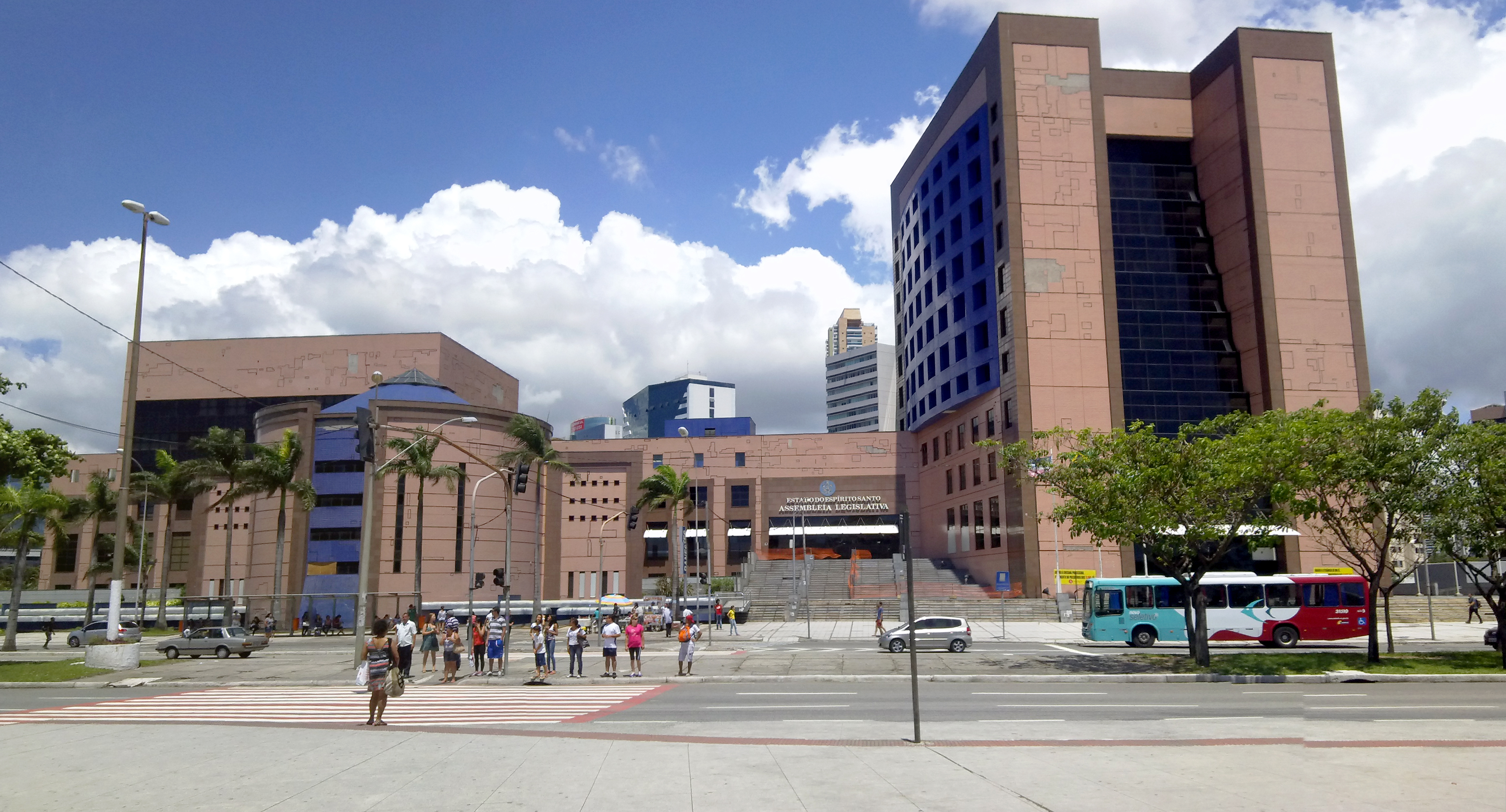 Assembleia Legislativa do Espírito Santo vista da entrada do Shopping Vitória